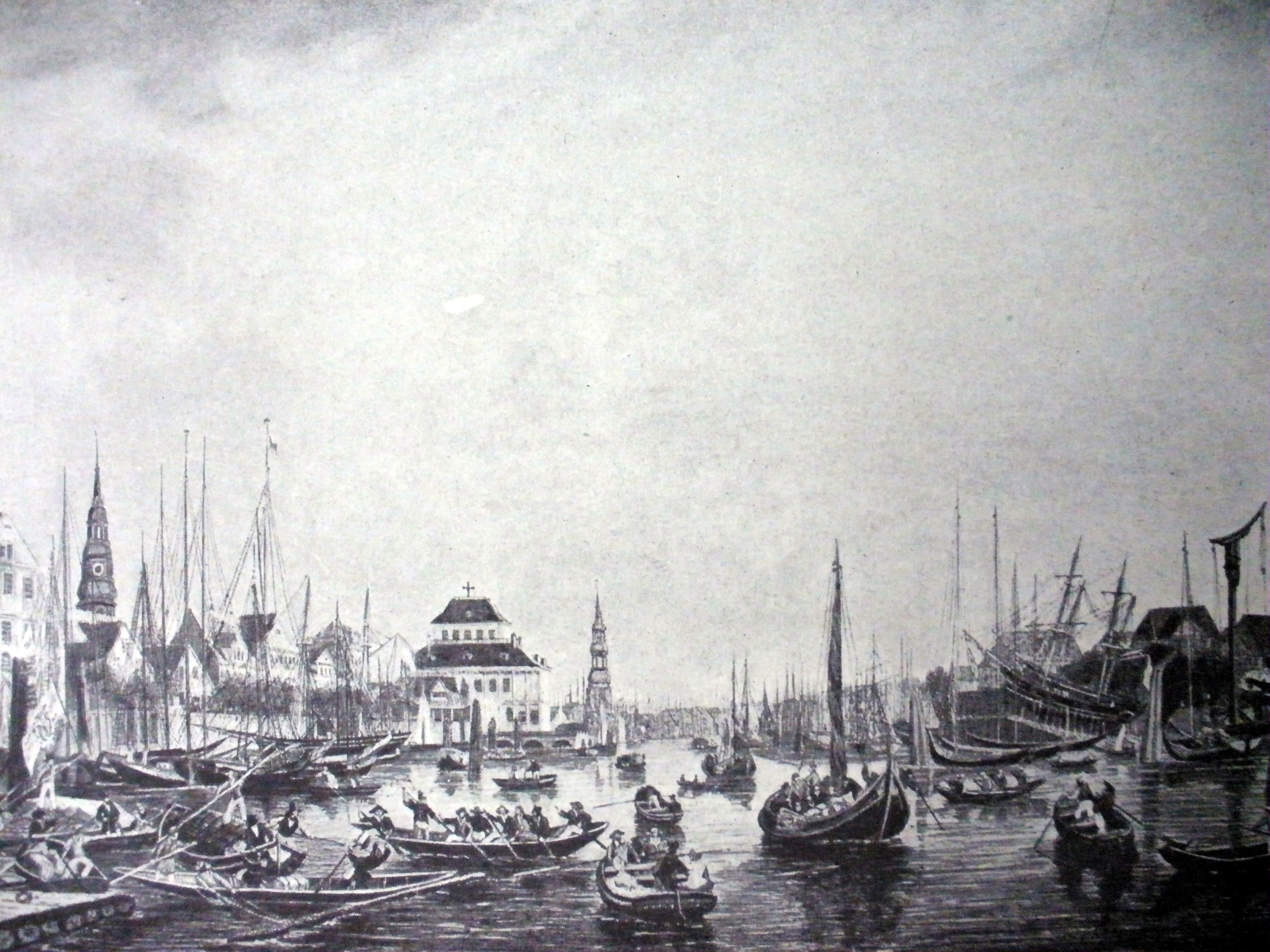 Kupferstich, Einblick in den Binnenhafen beim Kehrwieder (Links Vorsetzen/Baumwall, darüber der alte Turm von St. Nikolai. Dann das über/ins Wasser gebaute Baumhaus (Schifferbörse, Gast-, Zoll- und Telegraphenaus, 1857 abgerissen). Links in der Ferne der Turm von St. Katharinen. Rechts der Kehrwieder mit Schiffswerft)